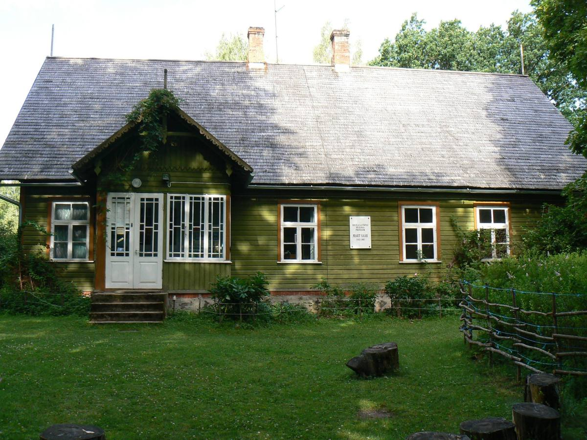 Mart Saare majamuuseum Hüpassaares, ehitatud 1911. aastal.